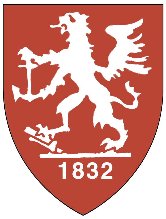 Escudo del Diario de la Marina, publicado en La Habana.